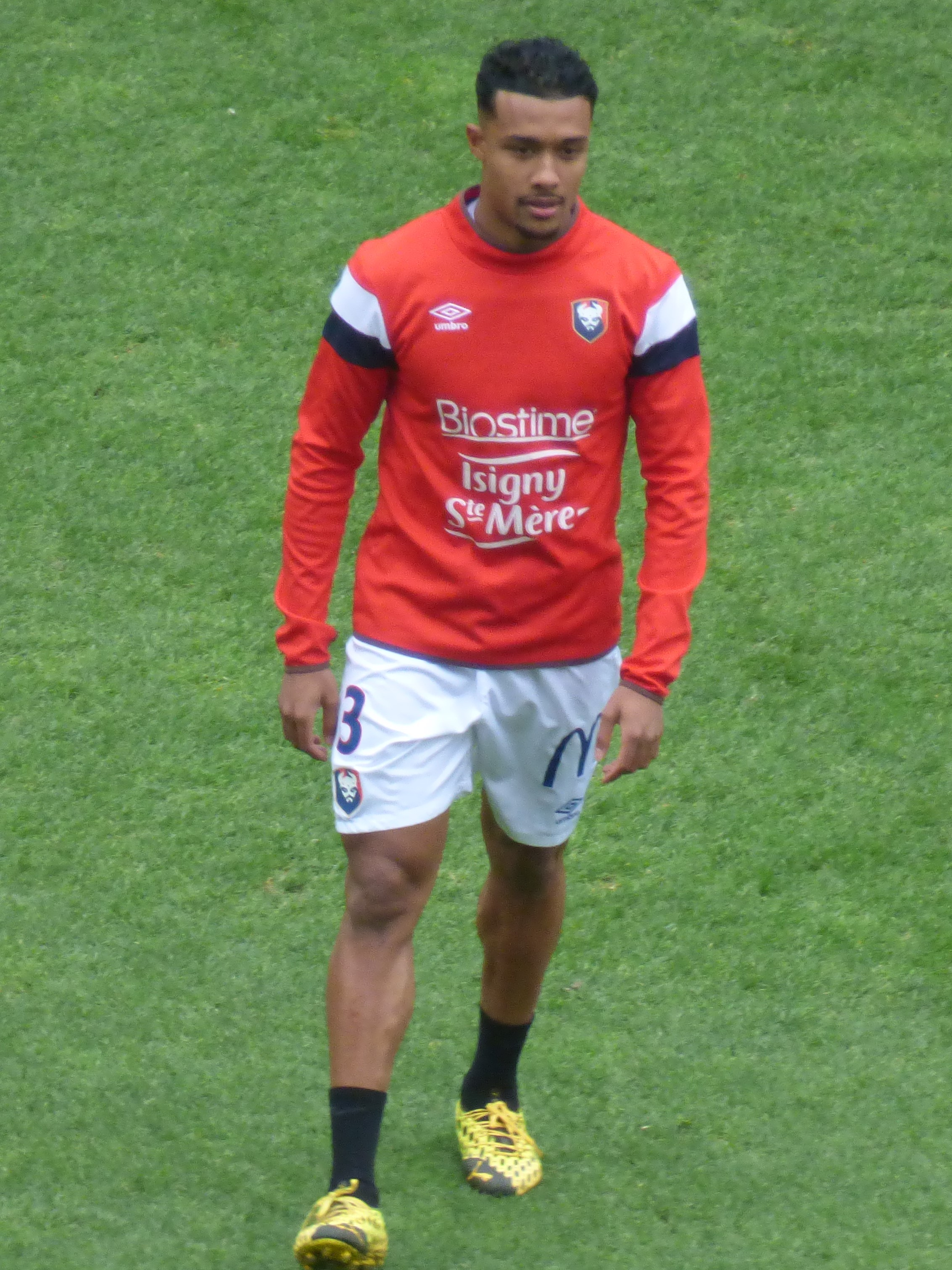 Yoël Armougom avant le match RC Lens / SM Caen, comptant pour la vingt-sixième journée du championnat de France de football de Ligue 2 2019/2020, le 22 février 2020, au Stade Bollaert-Delelis